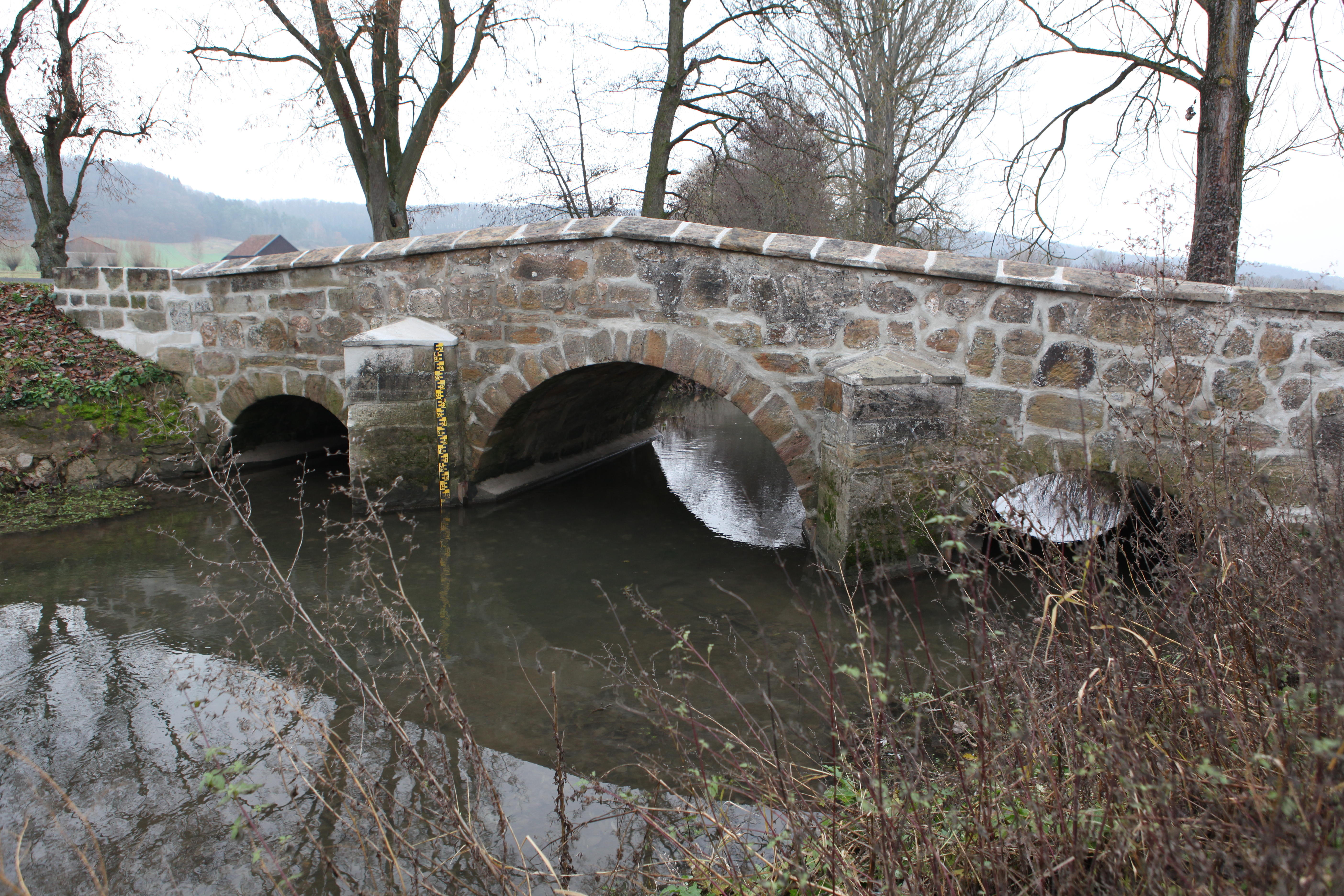 Rodachbrücke in Gauerstadt, Lkr. Coburg